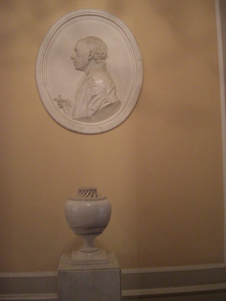 Белый зал в Большом Гатчинском дворце. Барельеф А. Ринальди работы Ф. Шубина